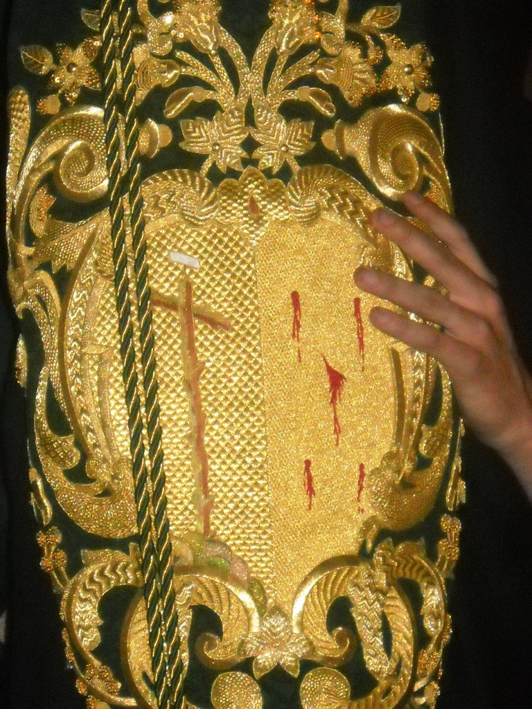 Escudo que aparece en el bacalao de la Hermandad